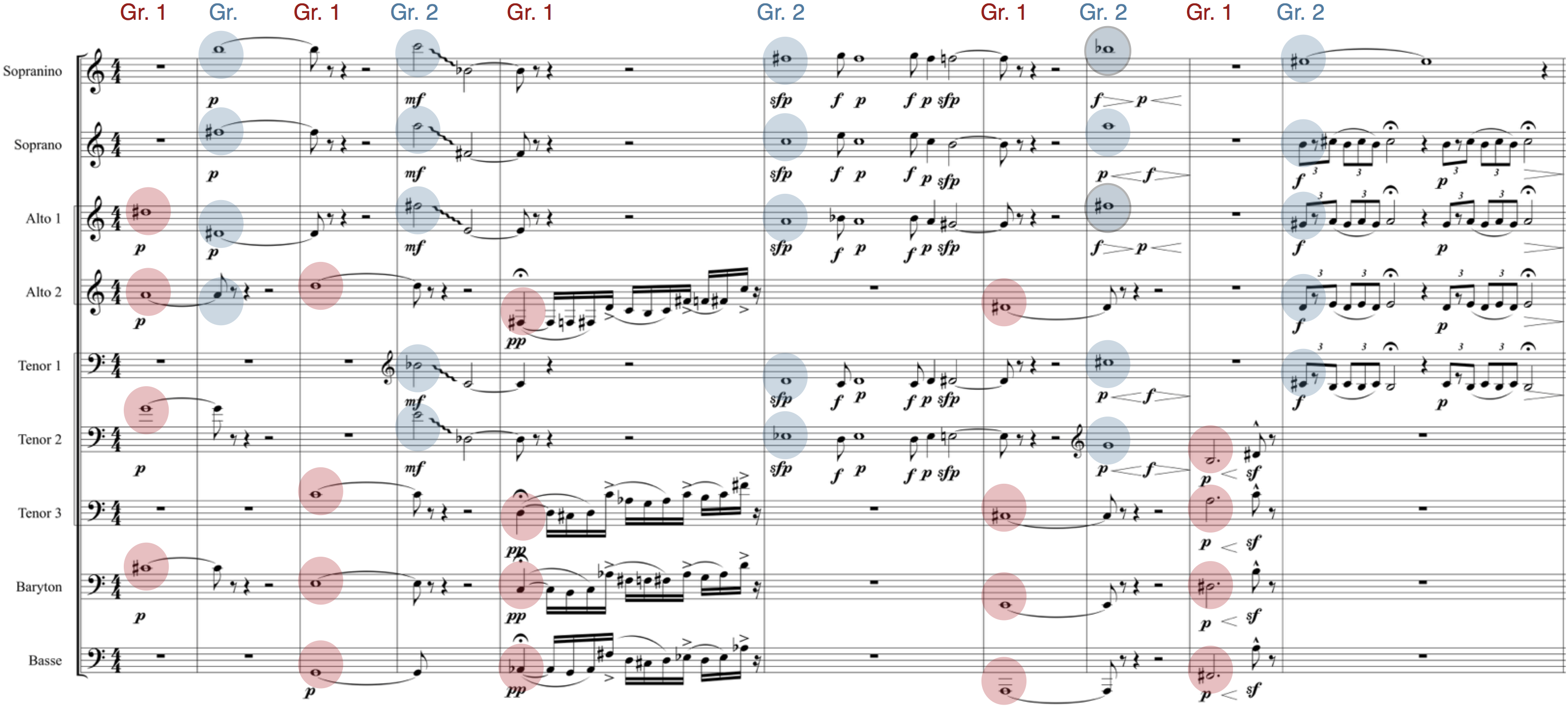 Extrait de la pièce XVII d'Anna Livia Plurabelle d'André Hodeir